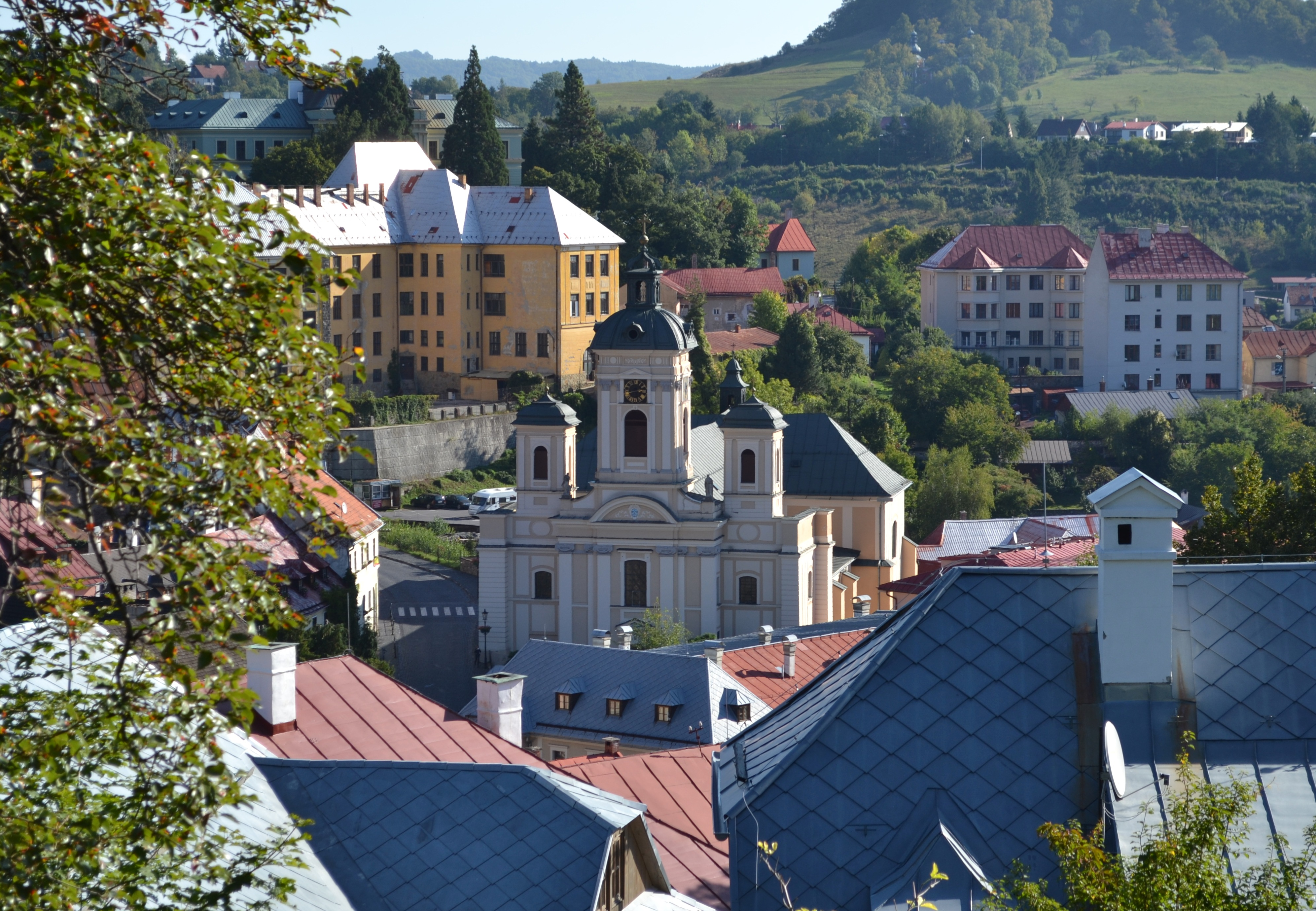 Kostol Nanebovzatia Panny Márie v Banskej Štiavnici